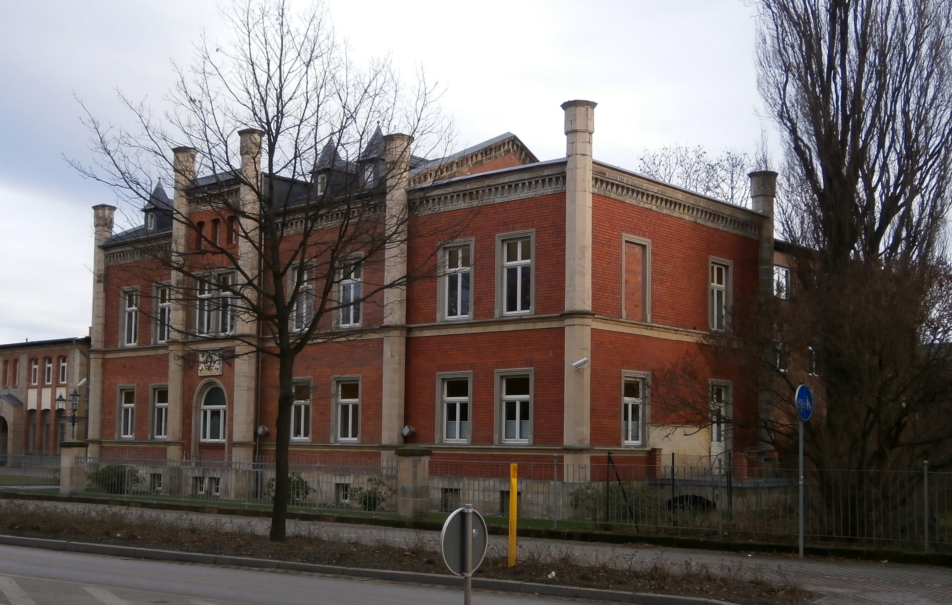 Haus Rathenaustraße 9 in Quedlinburg